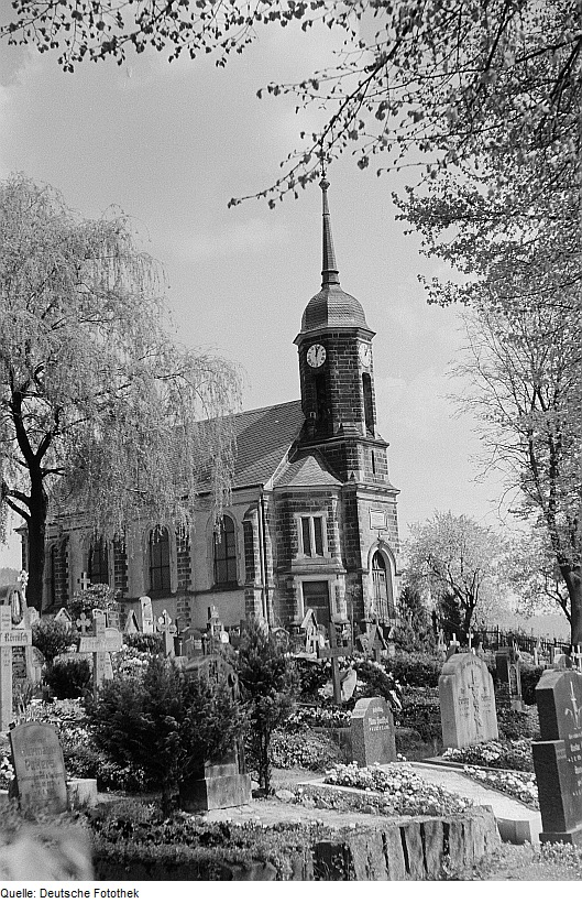 Original image description from the Deutsche Fotothek Kirche